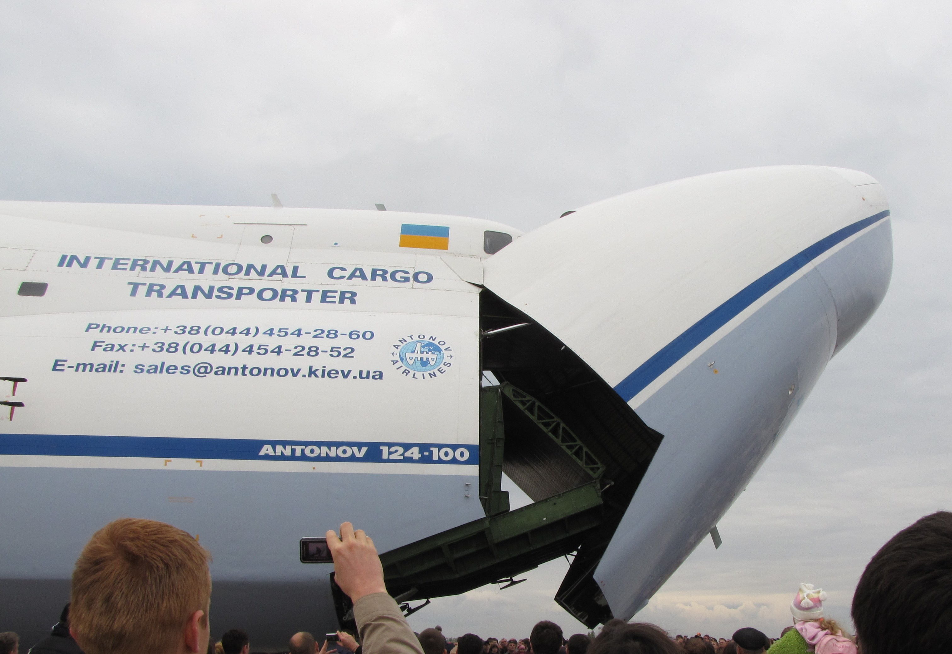 Авиасвит 2010